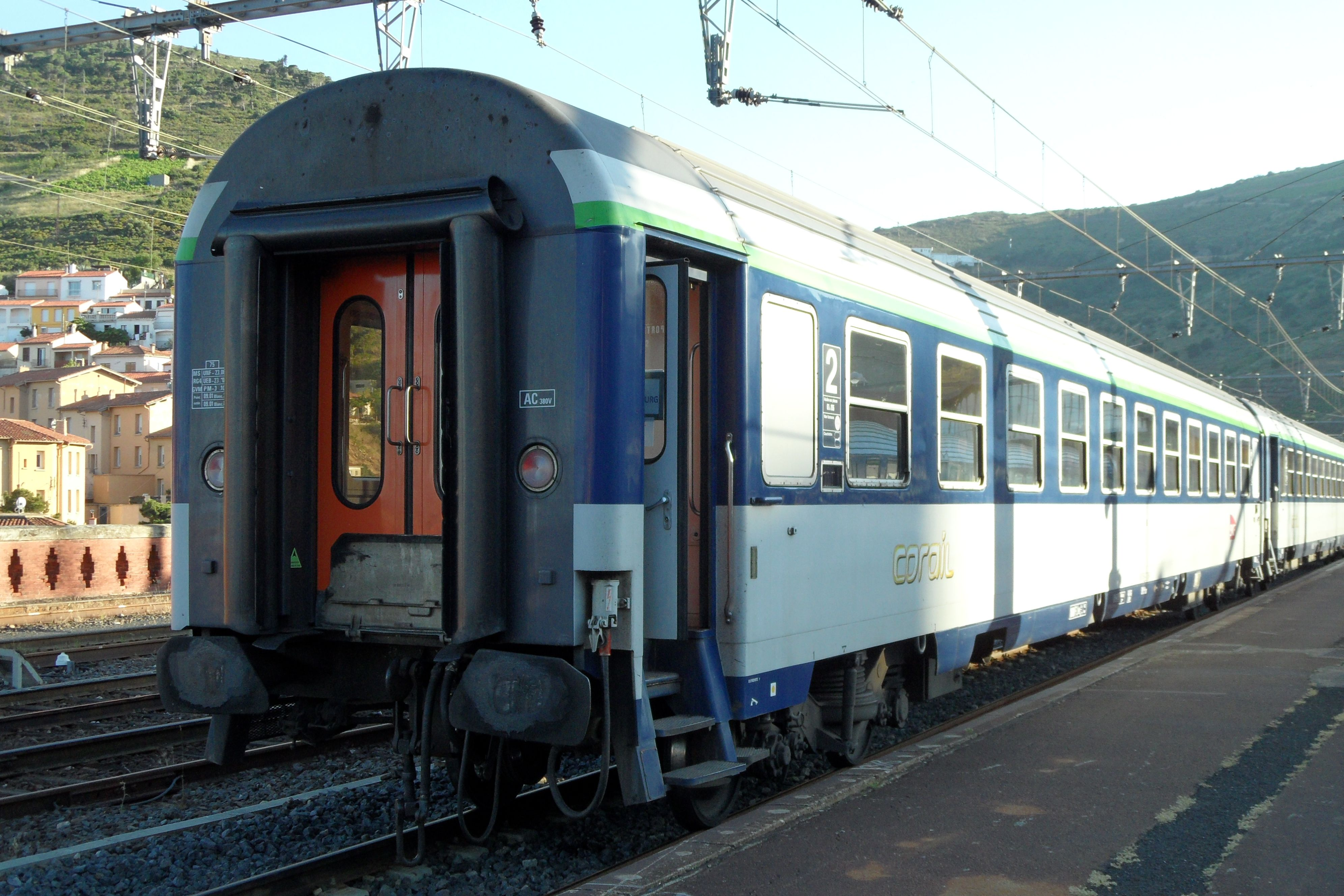 SNCF-Liegewagen 2. Klasse im Nachtzuganstrich der Neunziger, Corail Lunéa Cerbère–Strasbourg. Die überbreiten Pufferteller waren für den Verkehr mit Spanien für den Ausgleich des alten iberischen Pufferabstandes von 1950 Millimetern notwendig. Nur wenige Corail-Wagen wurden spurweitenübergreifend eingesetzt, trotzdem wurden sämtliche Wagen für Frankreich, Spanien und Portugal unabhängig vom Hersteller mit diesem Puffern geliefert.